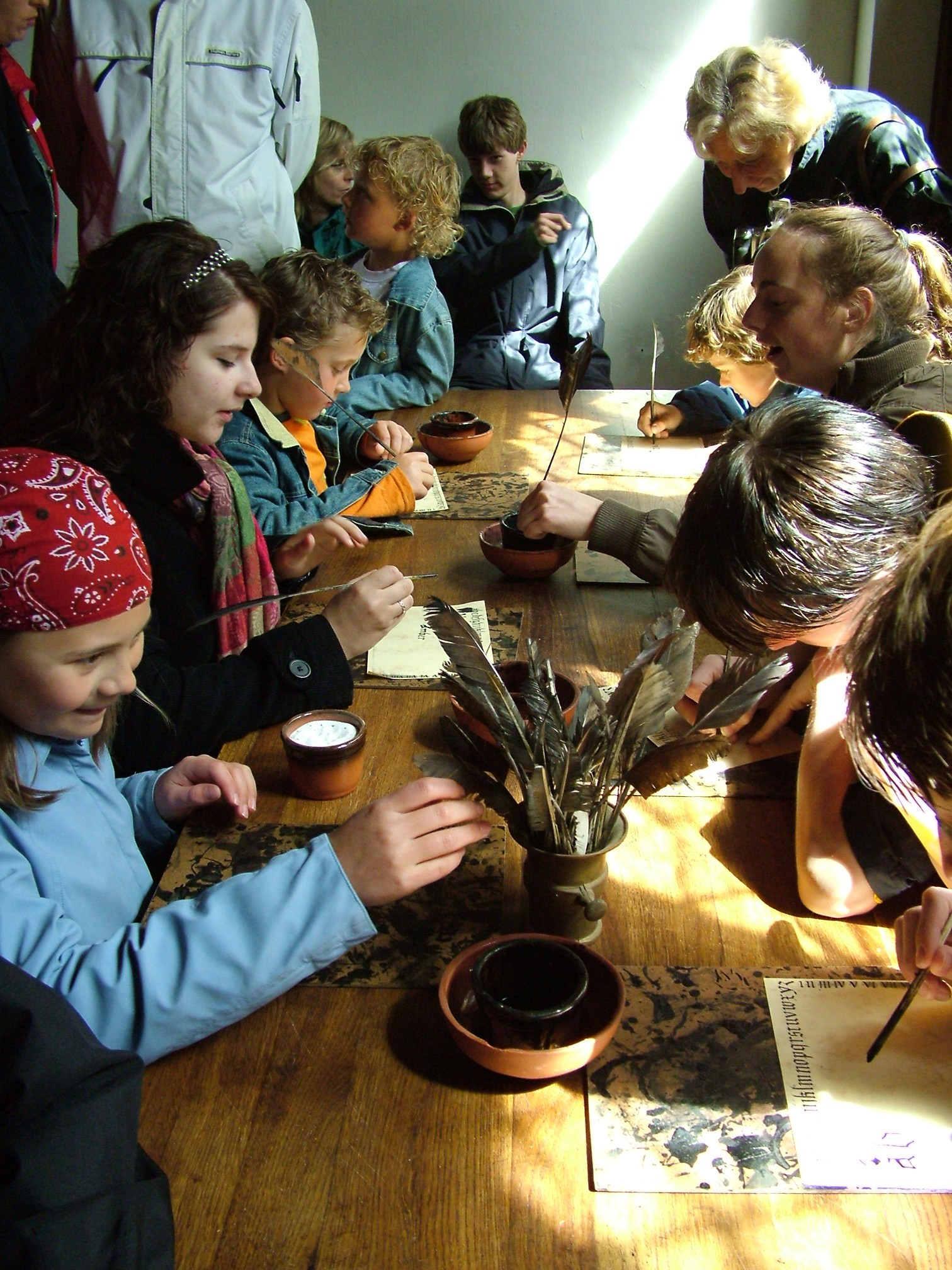 Archeon, kinderen schrijven met "middeleeuwse" veren